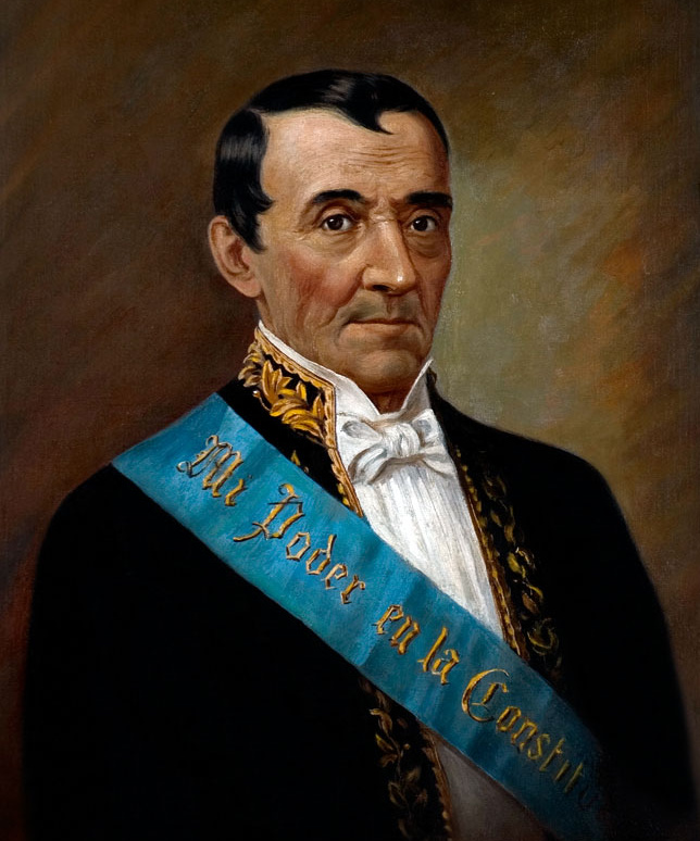 Diego de Noboa y Arteta (15 April 1789, in Guayaquil – 3 November 1870)